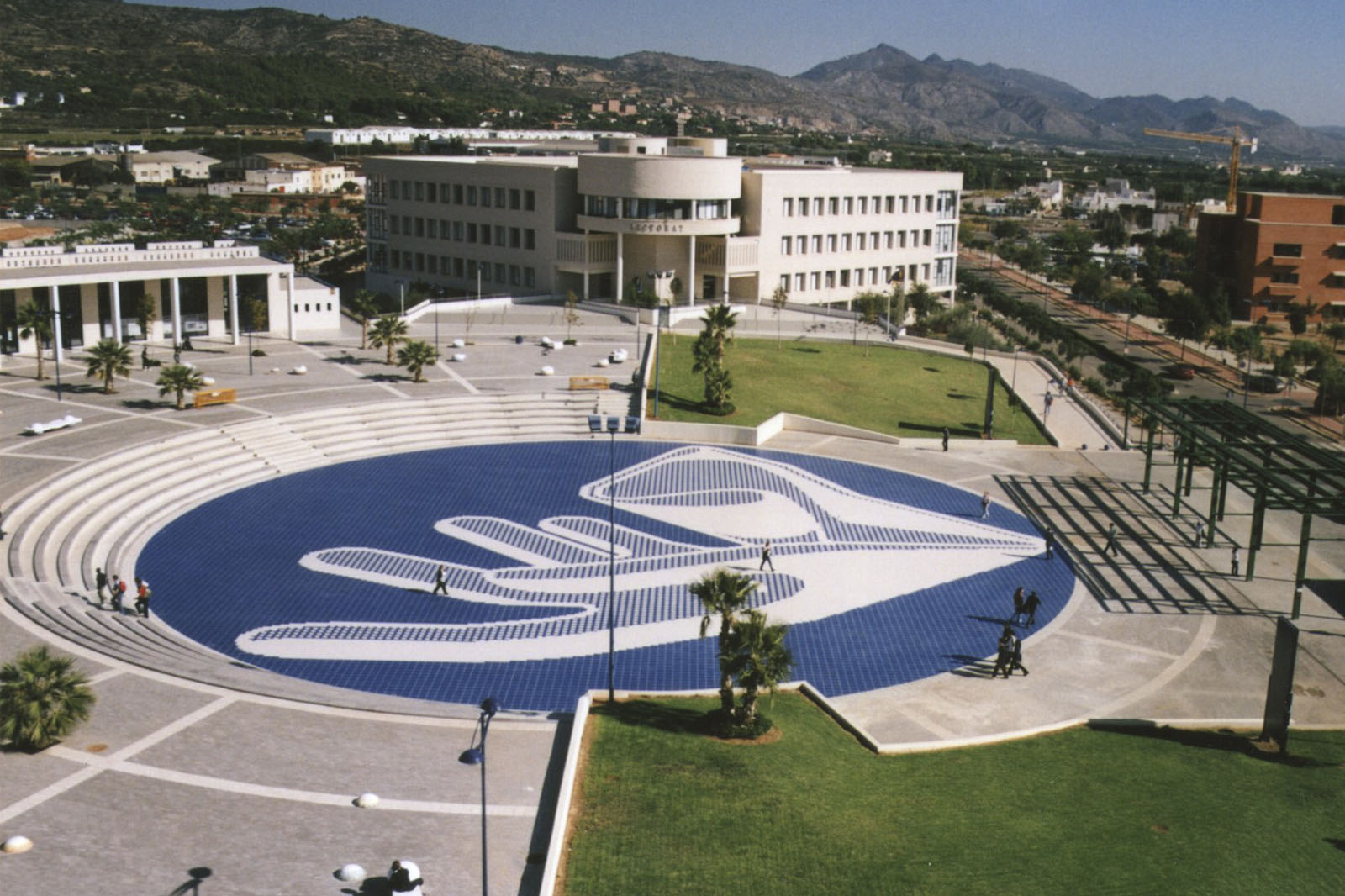 mosaico del Ágora de la Universitat Jaume I de Castellón, realizado por Manuel Sáez, Castellón, 2003